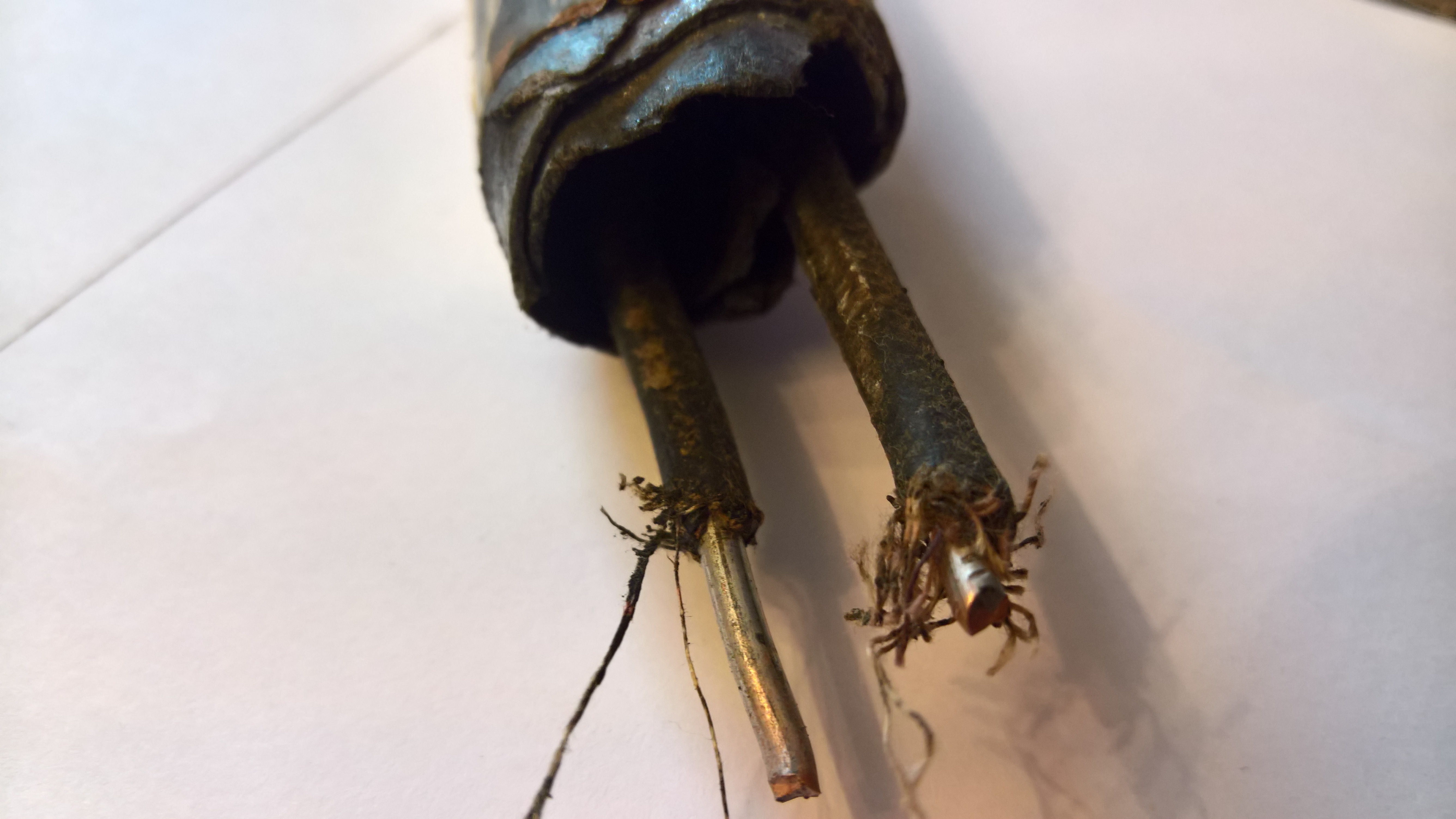 Bergmannrohr mit zwei Leitern 4mm². Die Leiter Bestehen aus verzinnten Kupfer mit einer Isolierung aus Gummi und Gewebe